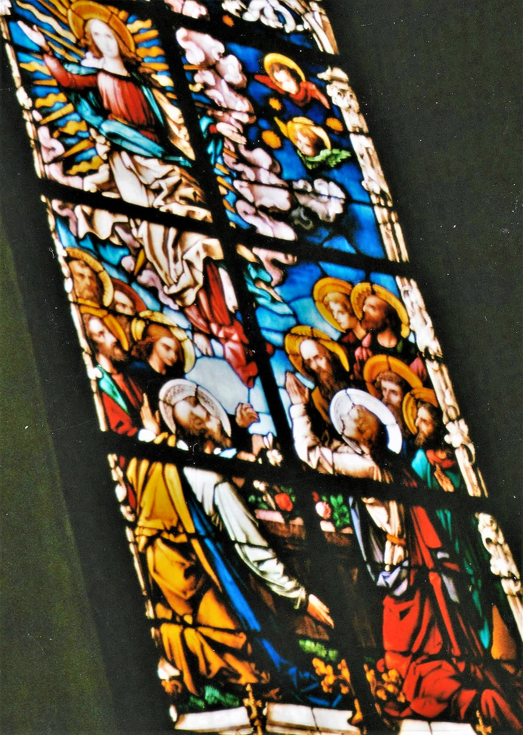 St. Michael (Lohr am Main), Chorfenster, Glorreicher Rosenkranz: Der dich, o Jungfrau, in den Himmel aufgenommen hat